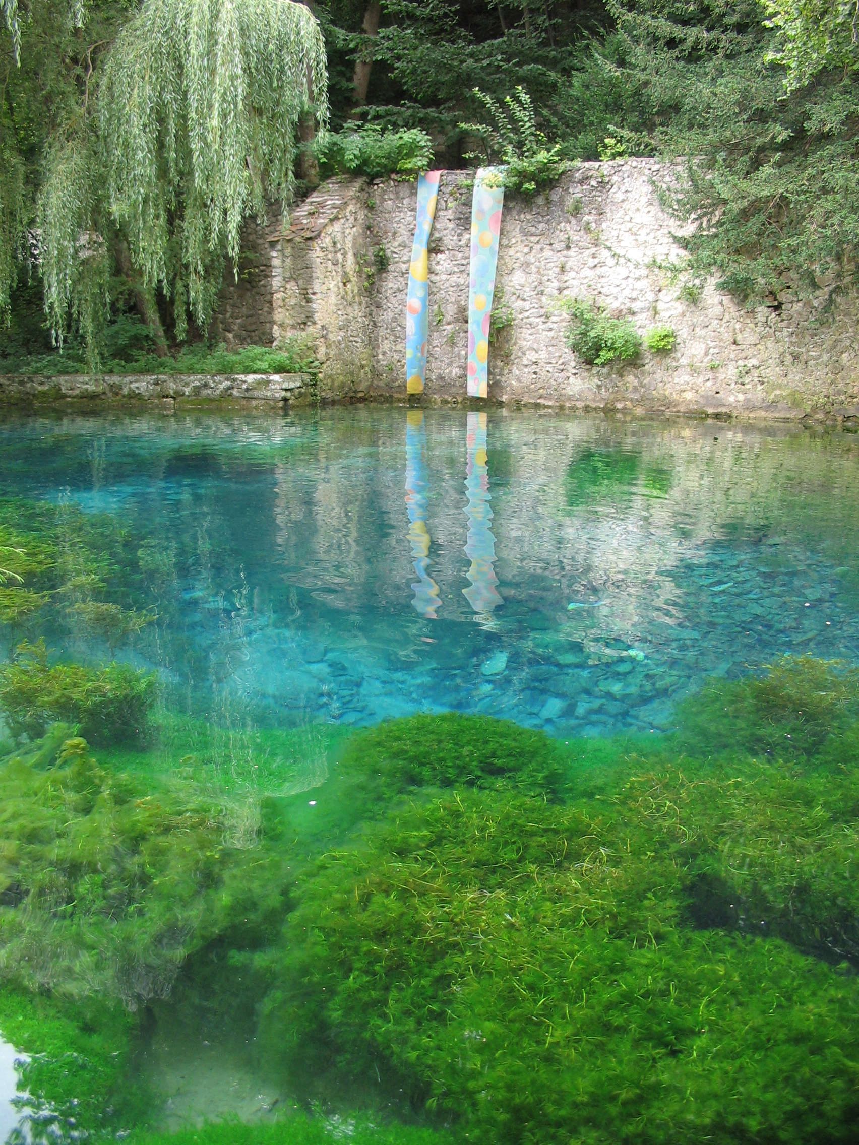 Karstquelle "Quelltopf des Urspring" im Kloster Urspring, Schelklingen.